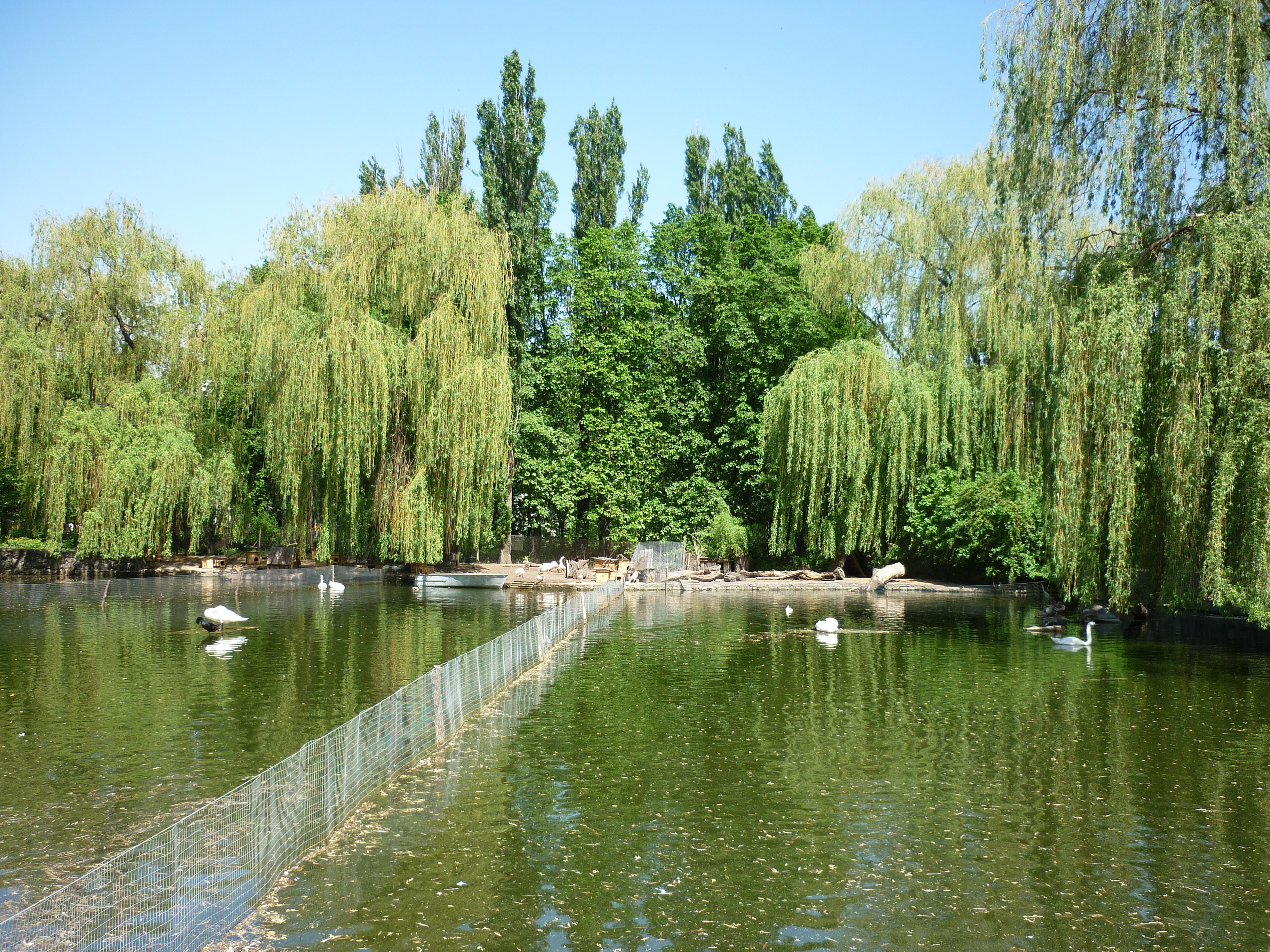 Черкаський зоологічний парк, м. Черкаси